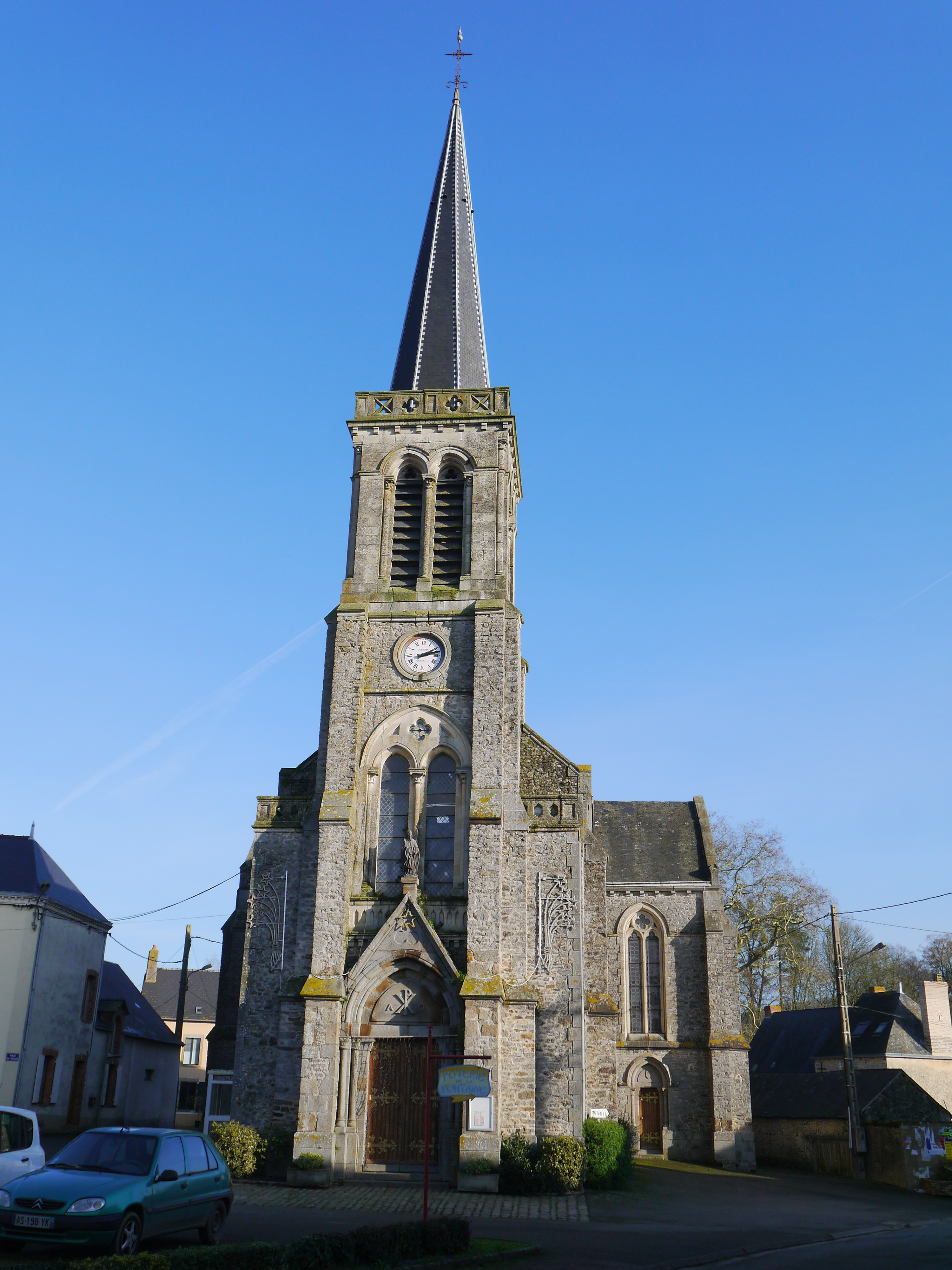 L'église Saint-Thuribe.